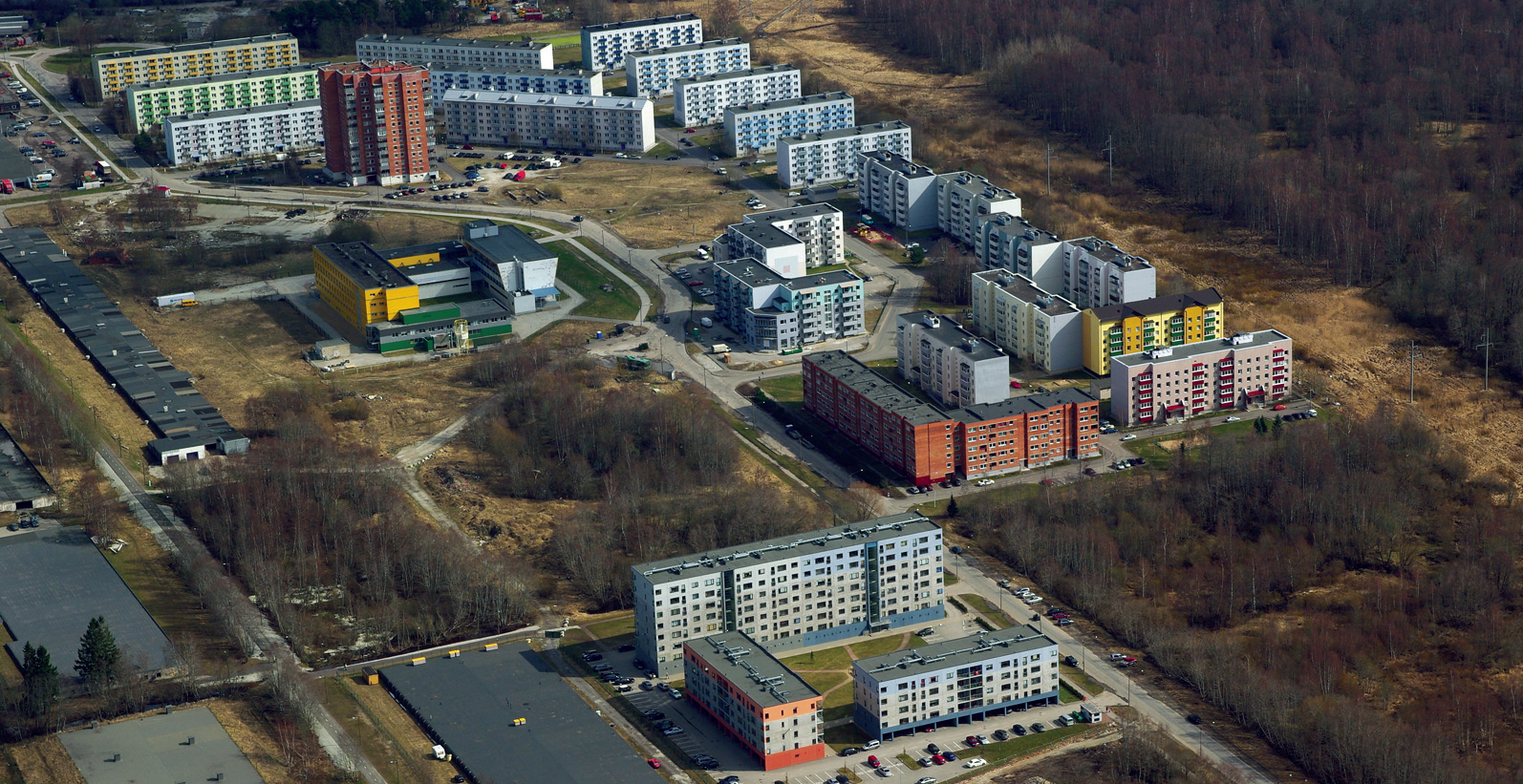 Astangu asumi aerofoto